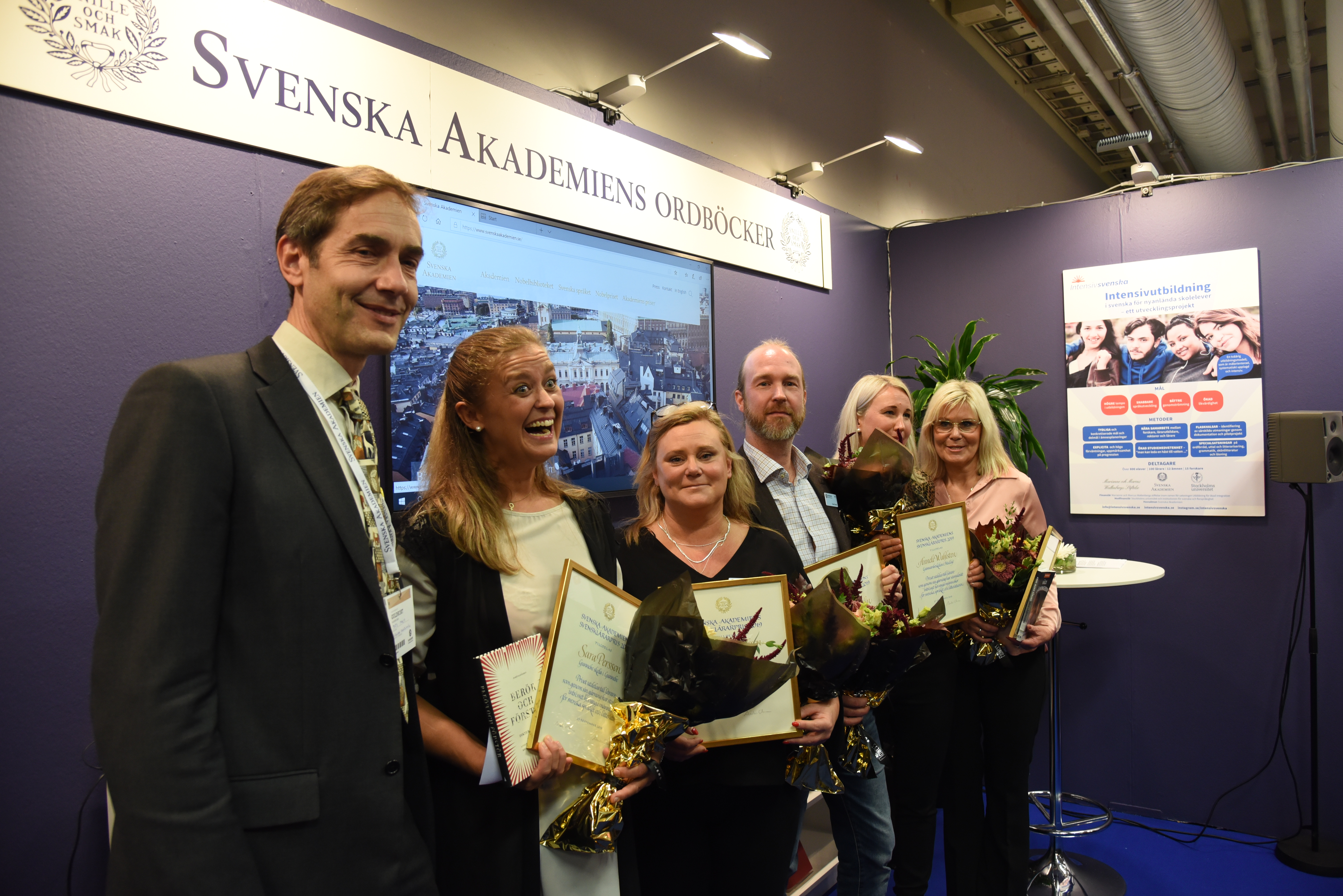 Mottagarna av Svenska Akademiens svensklärarpris 2019 Sara Persson, Camilla Edvardsson Lundmark, Daniel Sundin, Anneli Wahlsten och Anki Källman, tillsammans med Svenska Akademiens ständige sekreterare Mats Malm. Priset utdelat på Bokmässan i Göteborg den 27 september 2019.